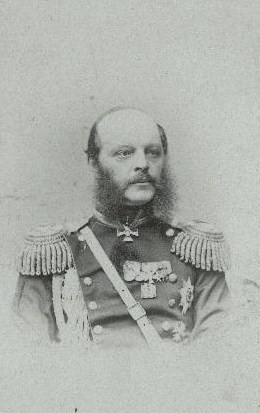 генерал Паткуль, Александр Владимирович